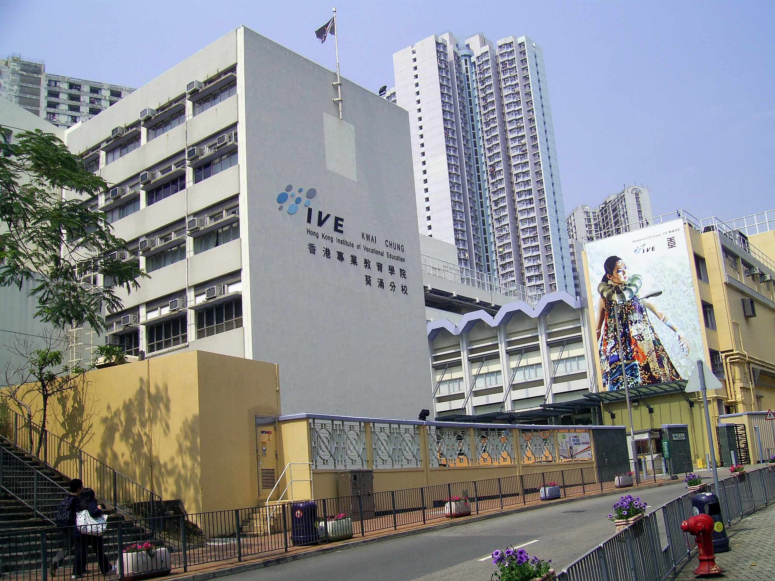 中文（香港）: 香港專業教育學院葵涌分校